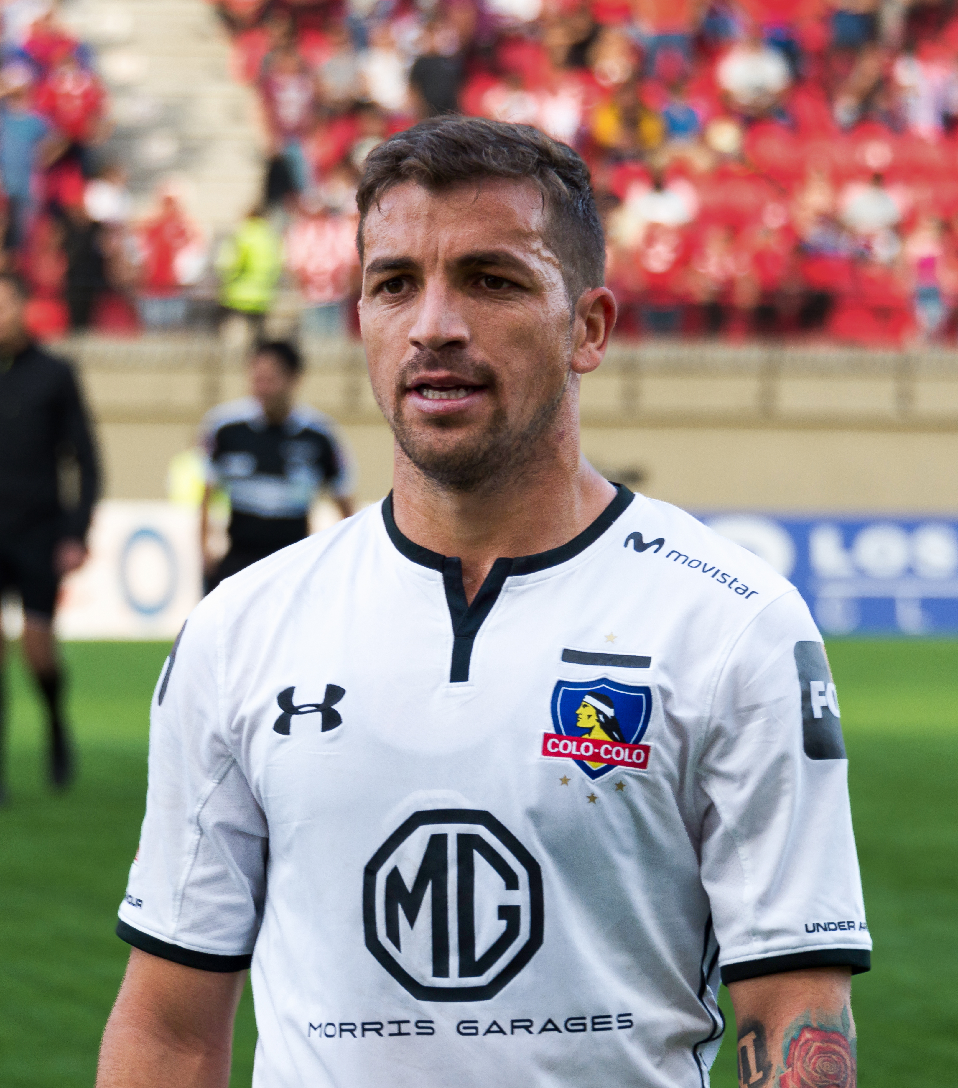 Gabriel Costa Heredia, Unión La Calera v Colo-Colo, Estadio Municipal Nicolás Chahúan Nazar, La Calera, Región de Valparaíso, Chile.